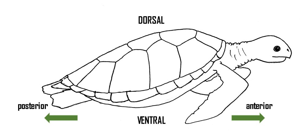 descrição anatômica de face ventral e dorsal, anterior e posterior